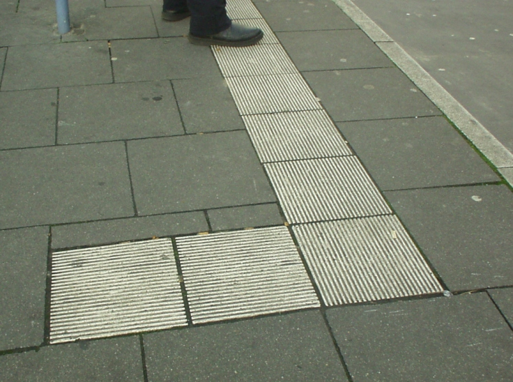 Strukturiertes Pflaster f. Blinde